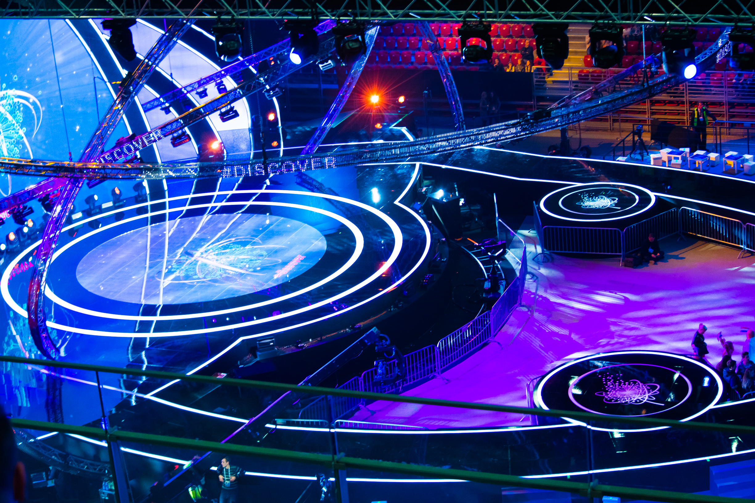 Сцена Детского Евровидения 2015, Арнна «Армеец», София (Болгария)